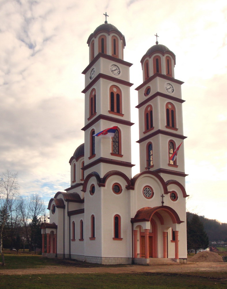 Храм_светог_архангела_Гаврила (Челинац)